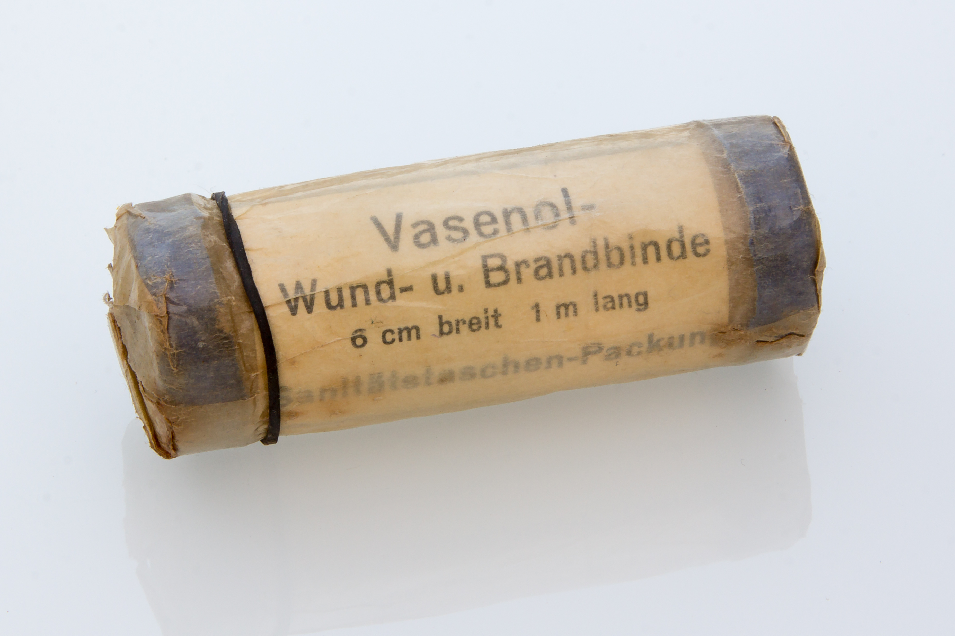 Vasenol Wund und Brandbinde aus einer Rotkreuzhelfertasche der 1930er Jahre